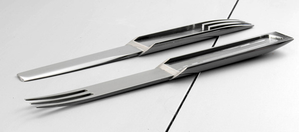 Couverts